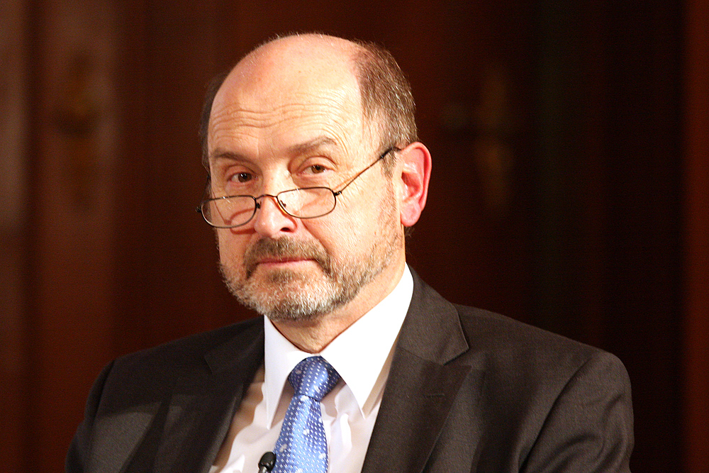 Stefan Hradil, deutscher Soziologe, 2010 in Frankfurt anlässlich der Verleihung der Zedler-Medaille